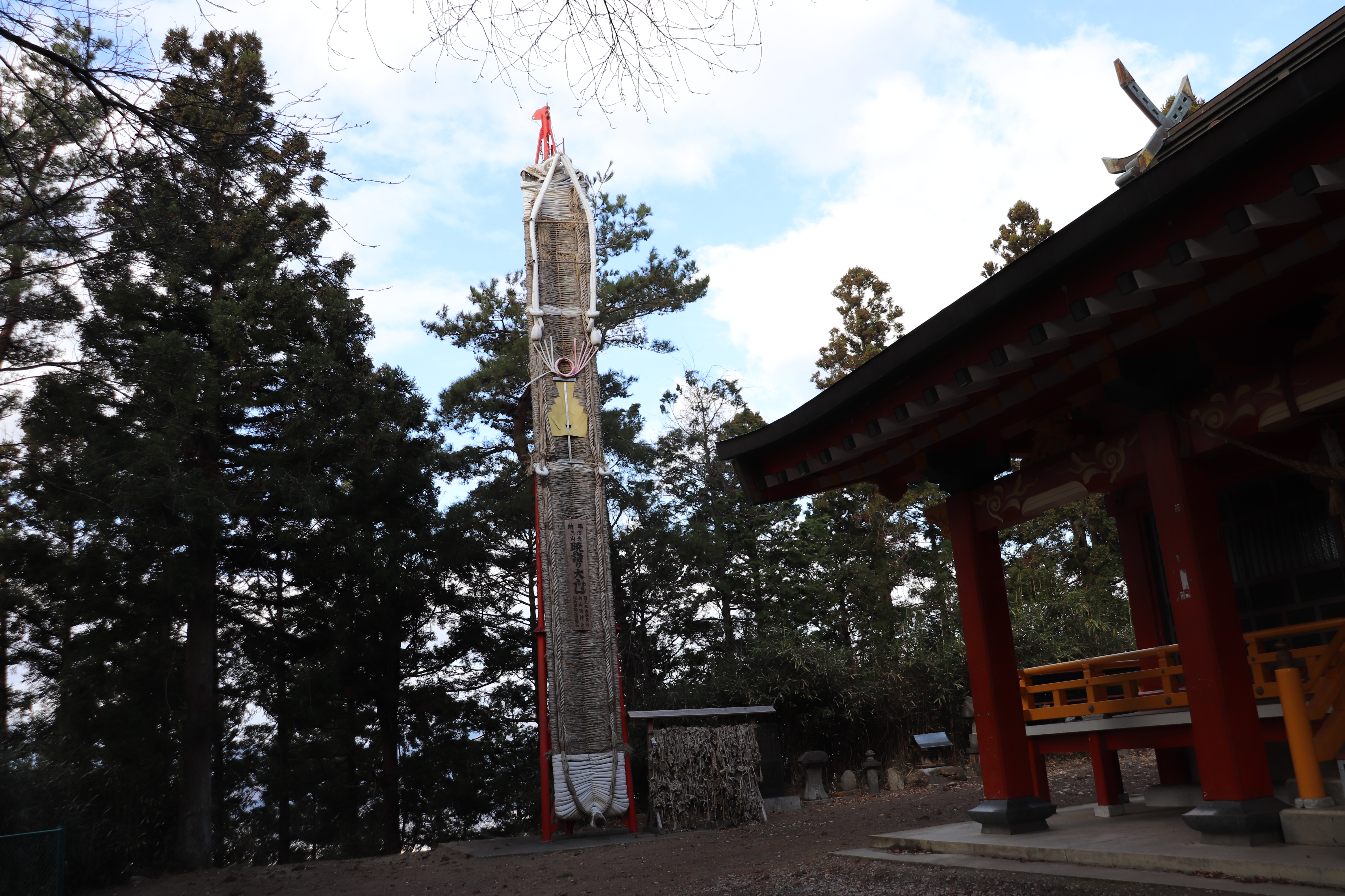 羽黒神社横に保管されている大わらじ。